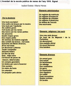 Inventari de l’escola pública de nenes (1916)